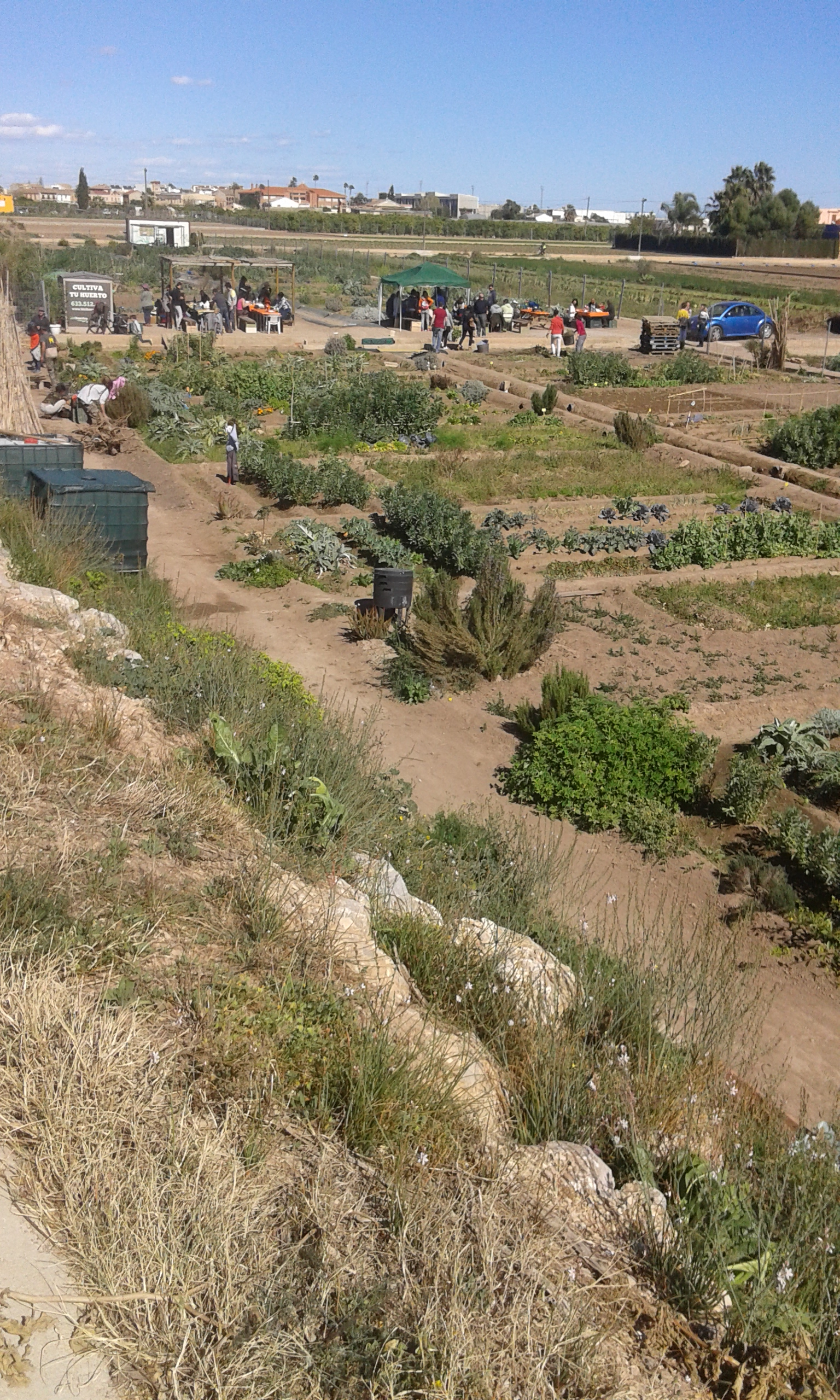 Horts urbans a Meliana vora la Via Xurra